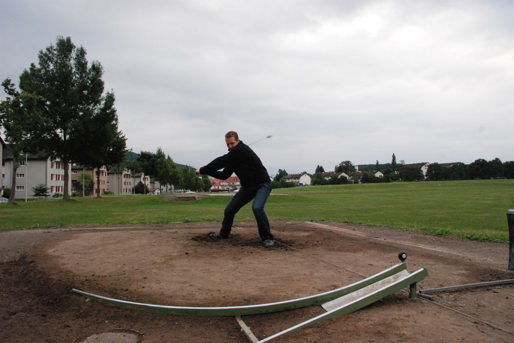 Hornussen in Ostermundigen, Kanton Bern